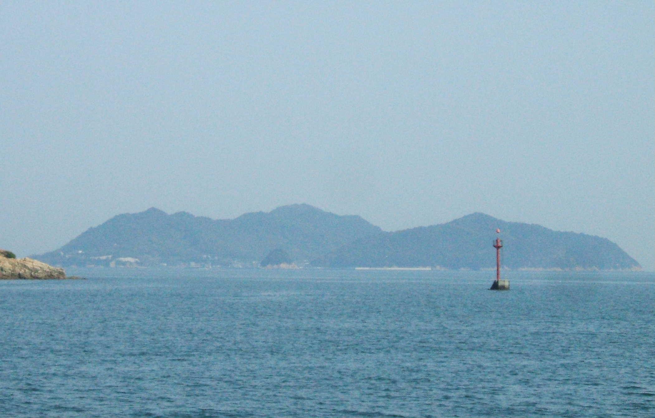 鞆の浦の市営桟橋から見た走島、左端にみえるのは仙酔島。